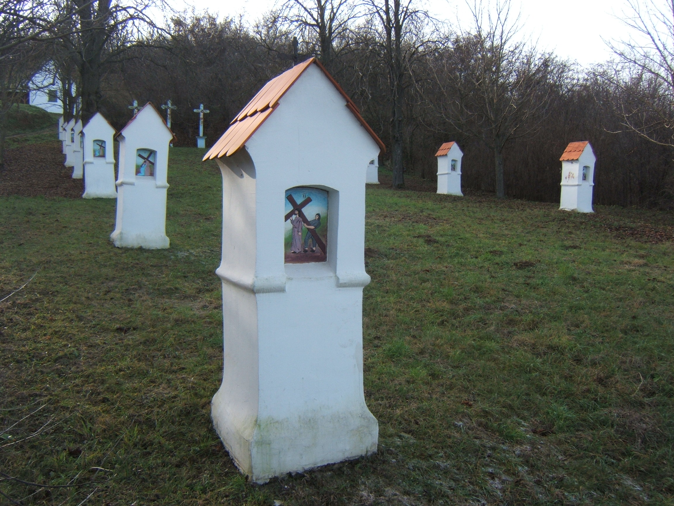 Görcsönydoboka, kálvária